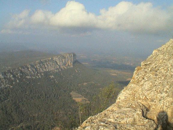 Photo prise depuis le sommet du Pic St Loup - Vue sur la falaise de l'Hortus. 2004. Cevenol2